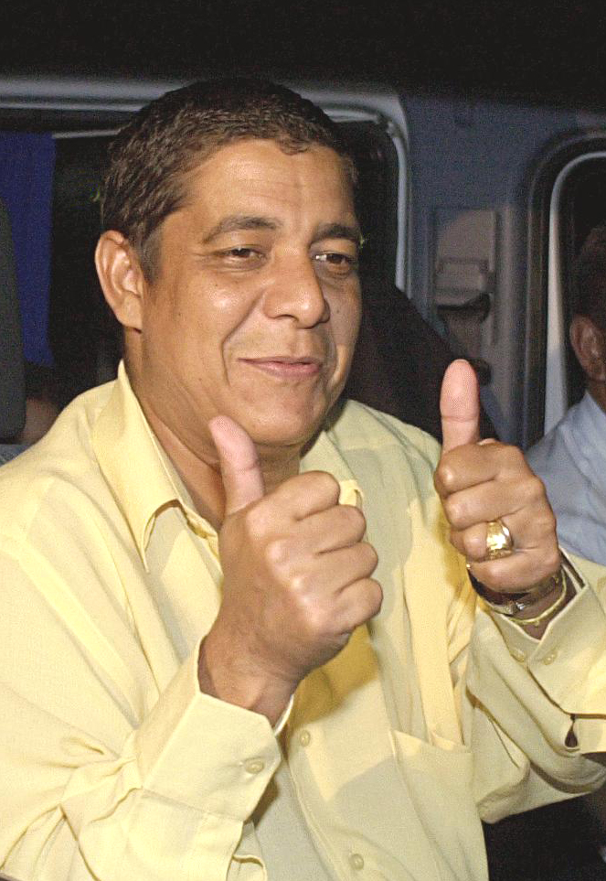 O cantor brasileiro Zeca Pagodinho.